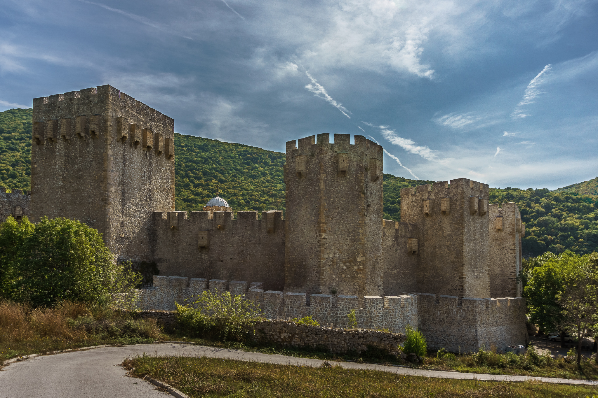 Ово је фотографија заштићеног природног добра у Србији под шифром: МПС11This is a a photo of a natural area in Serbia with ID: МПС11 Drevne zidine odolevaju zubu vremena